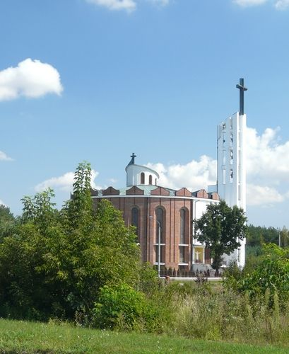 kościół parafialny p.w. Ducha Świętego w Poniatowej